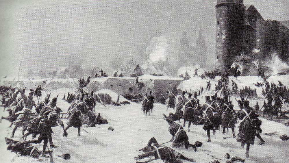 Erstürmung der Lutherstadt Wittenberg am 13.01.1814